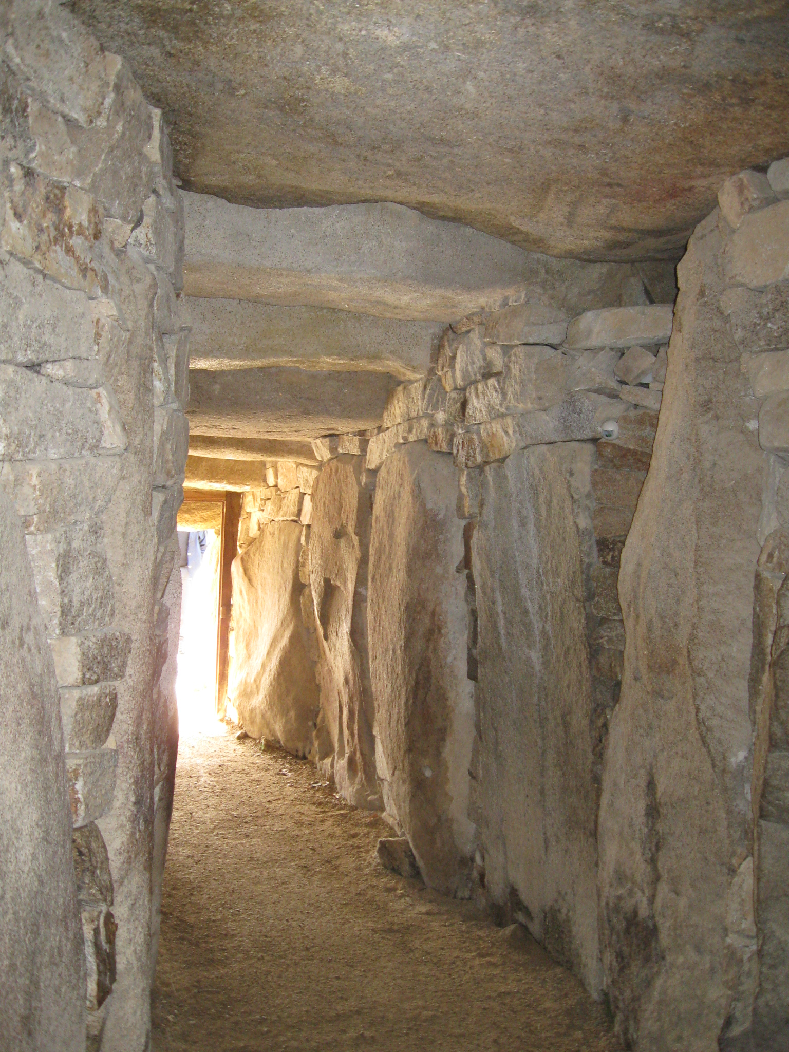 Cairn Table des Marchand, Dolmengang von der Kammer aus gesehen